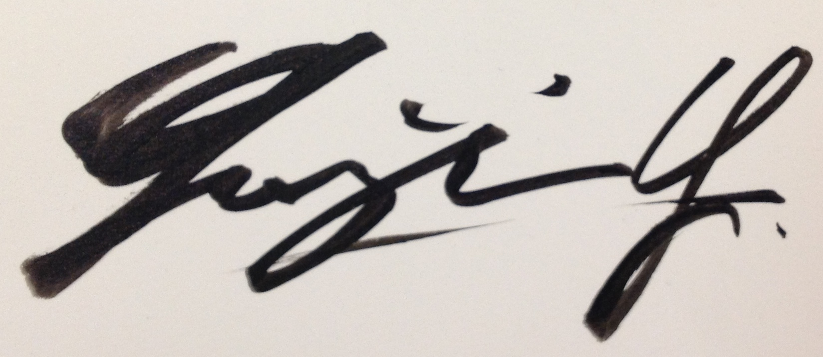 山本祐嗣のサイン。